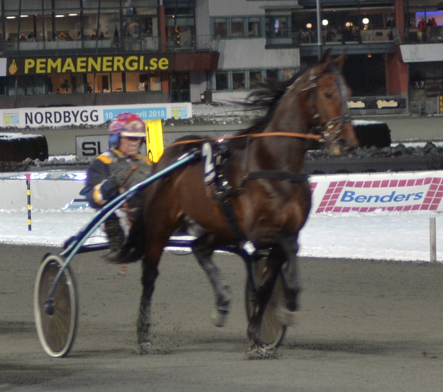 French Laundry (tränad av Stefan Melander) med kusken Torbjörn Jansson inför Gösta Nordins Lopp på Solvalla 2017-12-13.